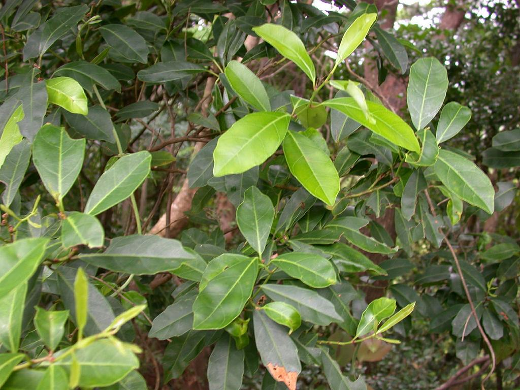 Itea oldhamii：ヒイラギズイナ 2004/08/11 沖縄島・名護市 Nafo city, Okinawa island